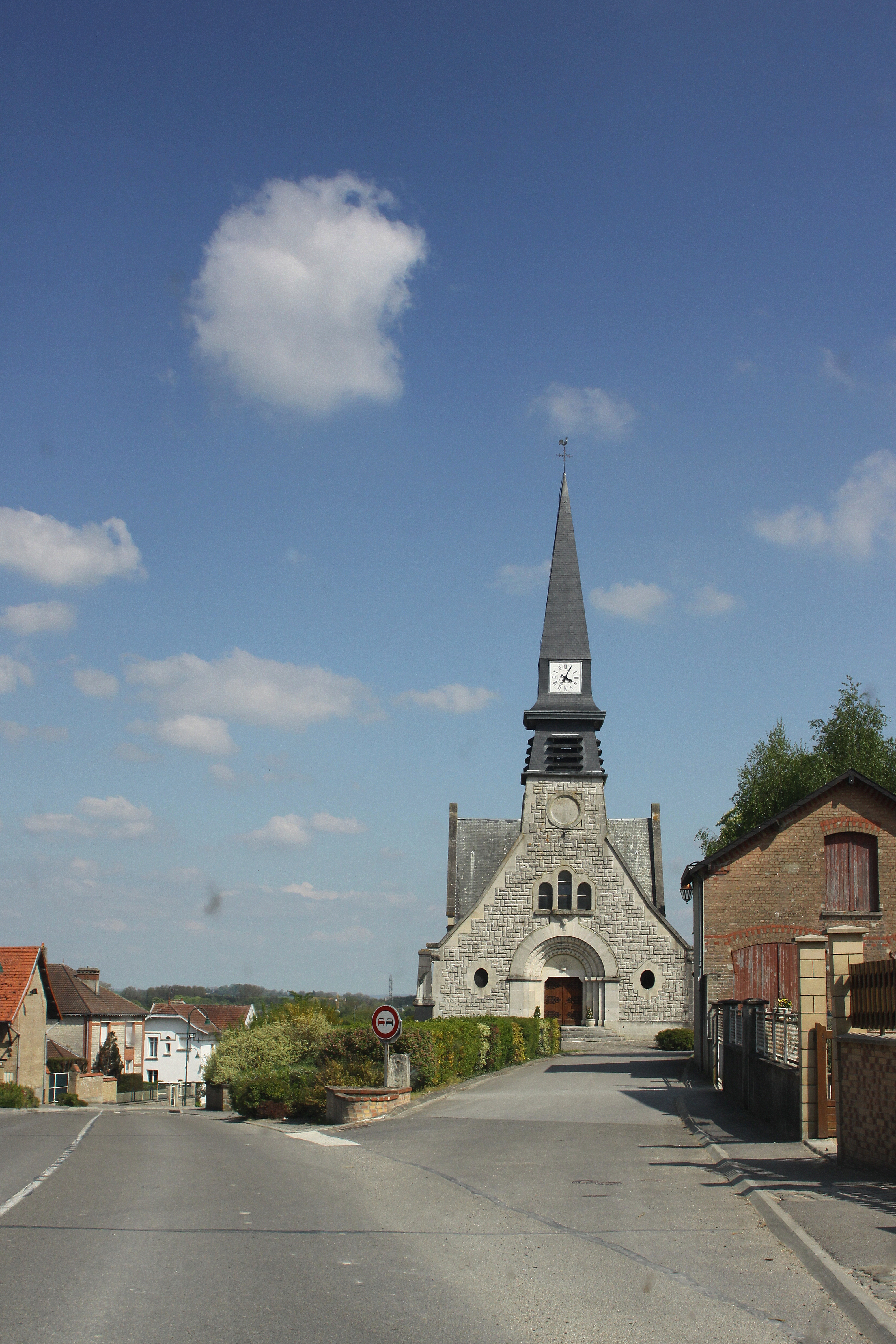 Vue an d'Uertschaft